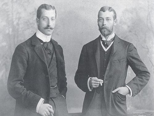 Futuro rei Jorge V com o seu irmão mais velho, o Príncipe Alberto Victor, Duque de Clarence